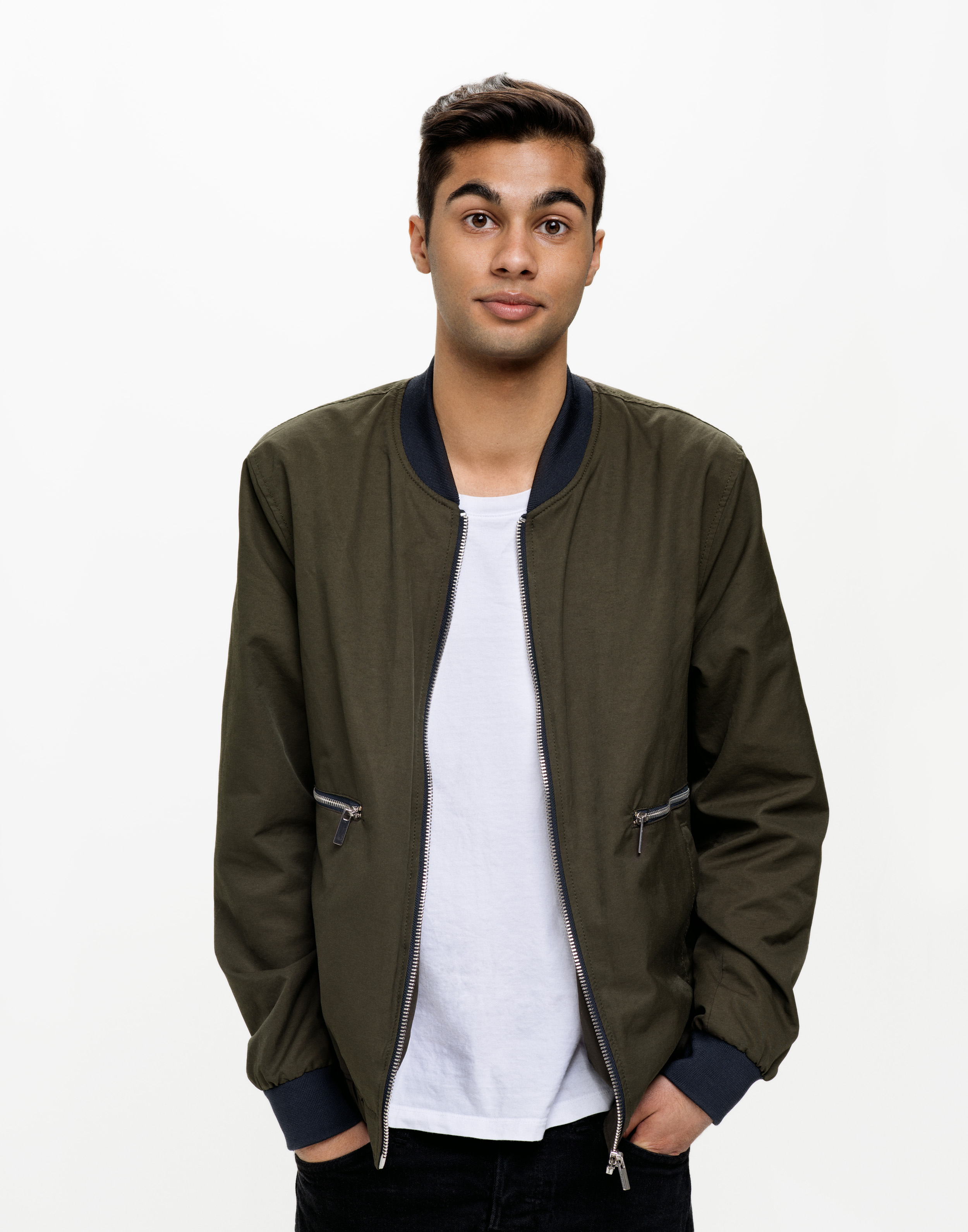 William Spetz, 2016.